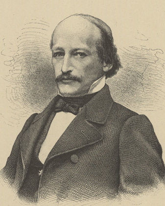 Karl Ludwig Rütimeyer (* 26. Februar 1825 in Biglen; † 25. November 1895 in Basel), 1865 Rektor der Universität Basel. Bildunterschrift der Universität Basel: Rütimeyer, Ludwig Geb. 25. Febr. 1825 zu Biglen (Emmenthal), 1850 Dr. med. und 1853 a. o. Prof. für vergleichende Anatomie in Bern, W. 1855 ord, Prof. der Zoologie und vergleichenden Anatomie in Basel, Rektor 1865, 2. Juni 1874 zum Dr. phil. ernannt. Quelle: Teichmann, Albert: Die Universität Basel in den fünfzig Jahren seit ihrer Reorganisation im Jahre 1835, Basel 1885.